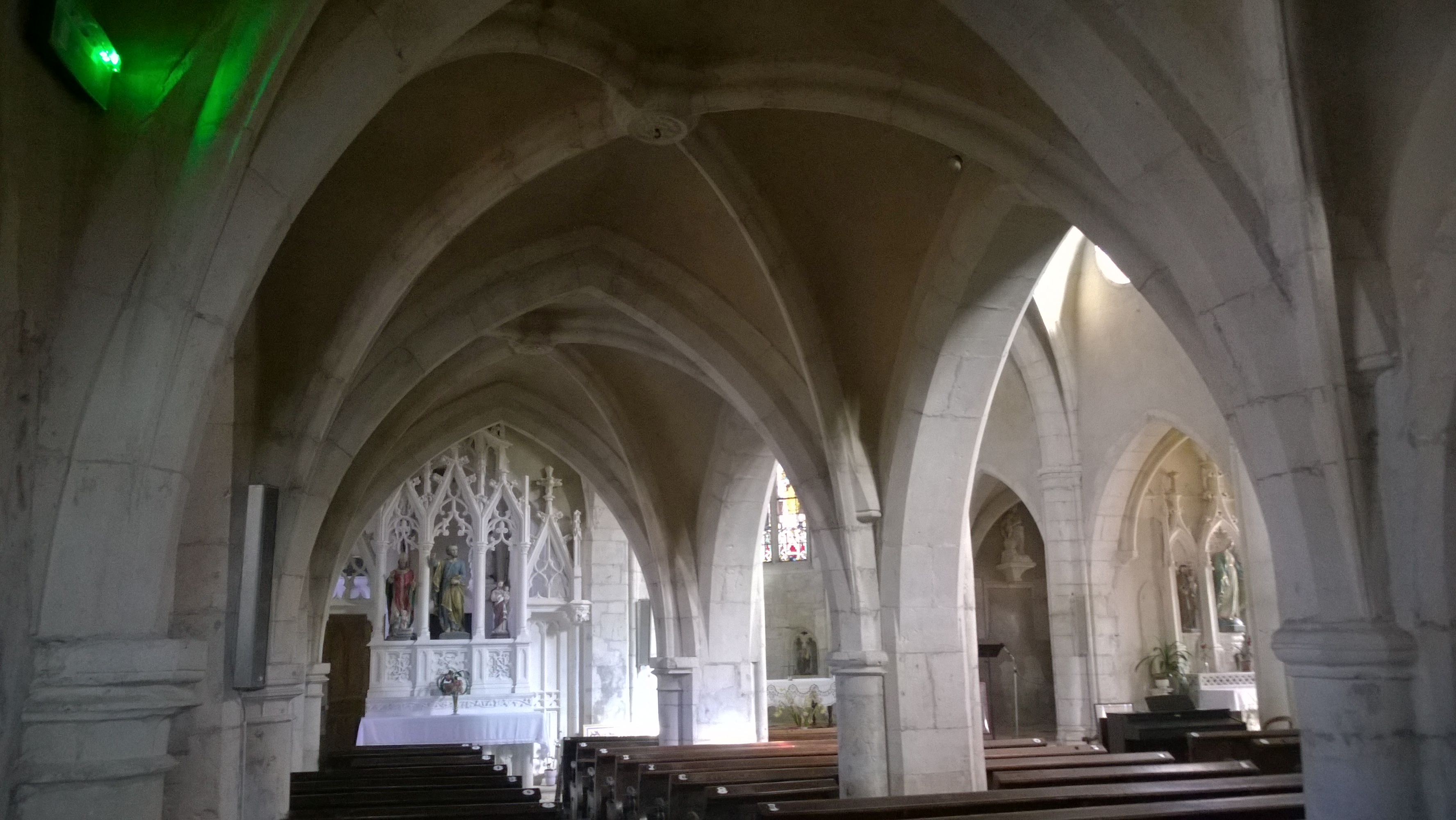 Église Saint-Pierre-aux-Liens du Template:S mini- siècle à Pulligny (Meurthe-et-Moselle, France) .